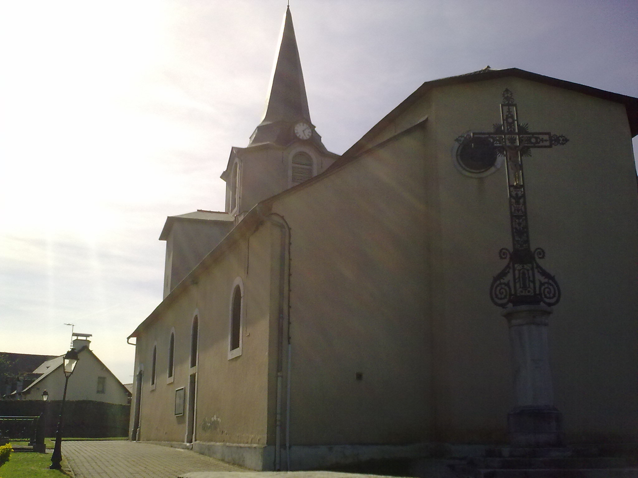 Barzun, France